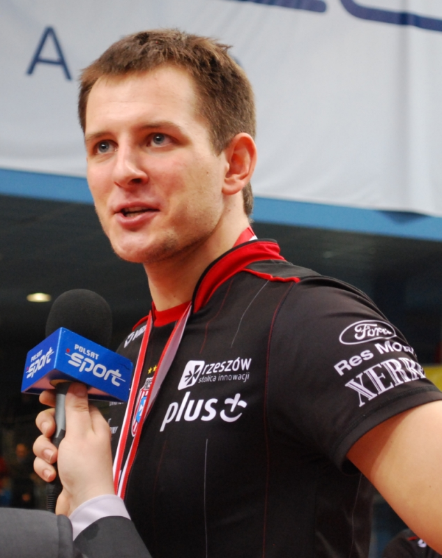 Bartosz Kurek Wicemistrz Polski 2012 ze Skrą Bełchatów.